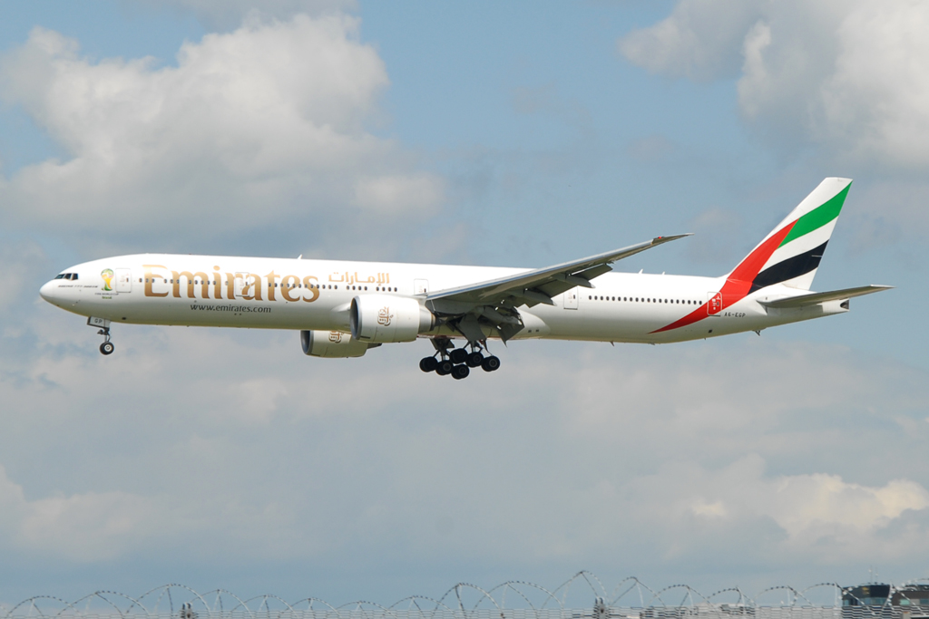 A6-EGP@LGW 05JUN14